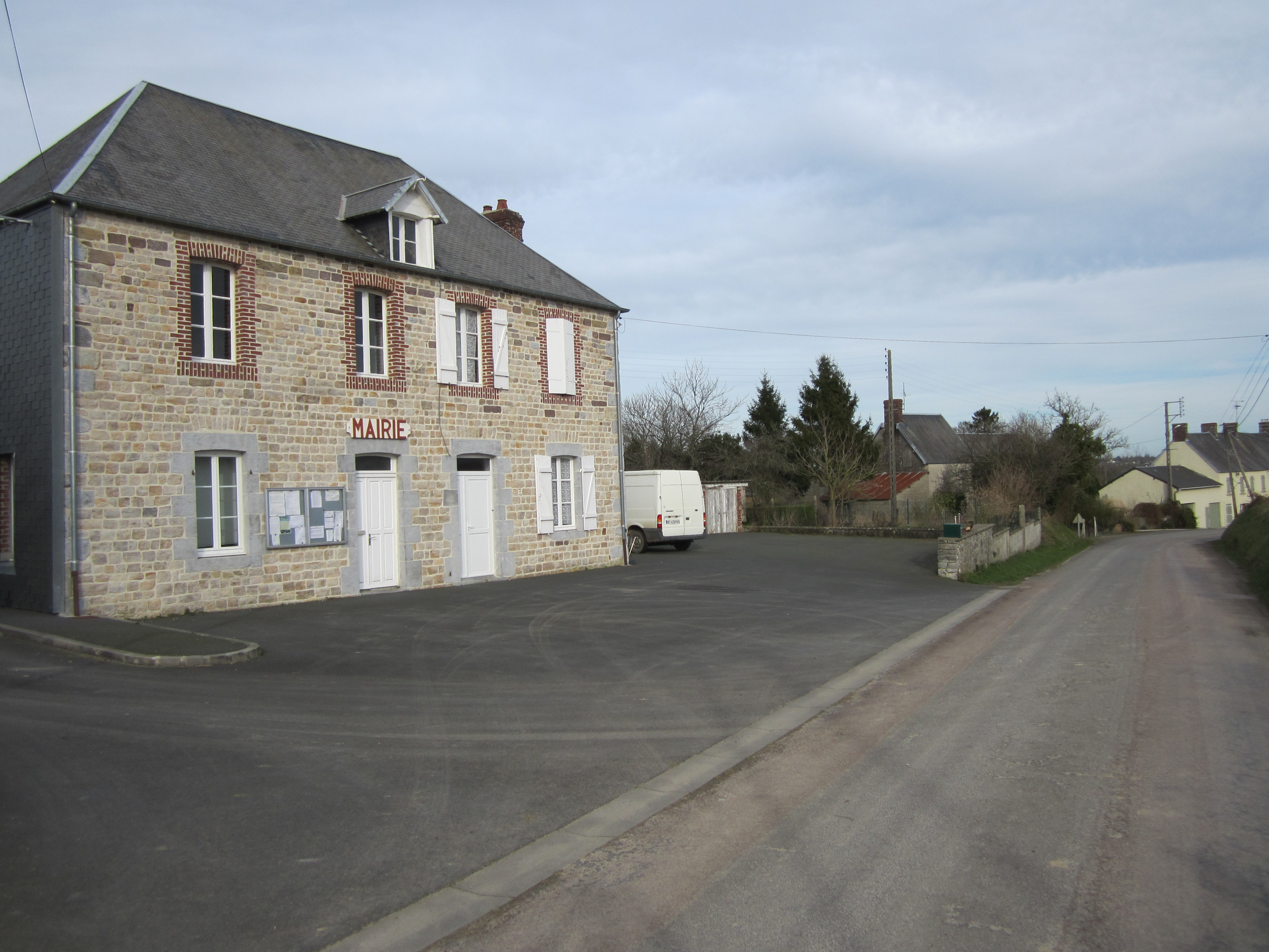 Guéhébert, Manche